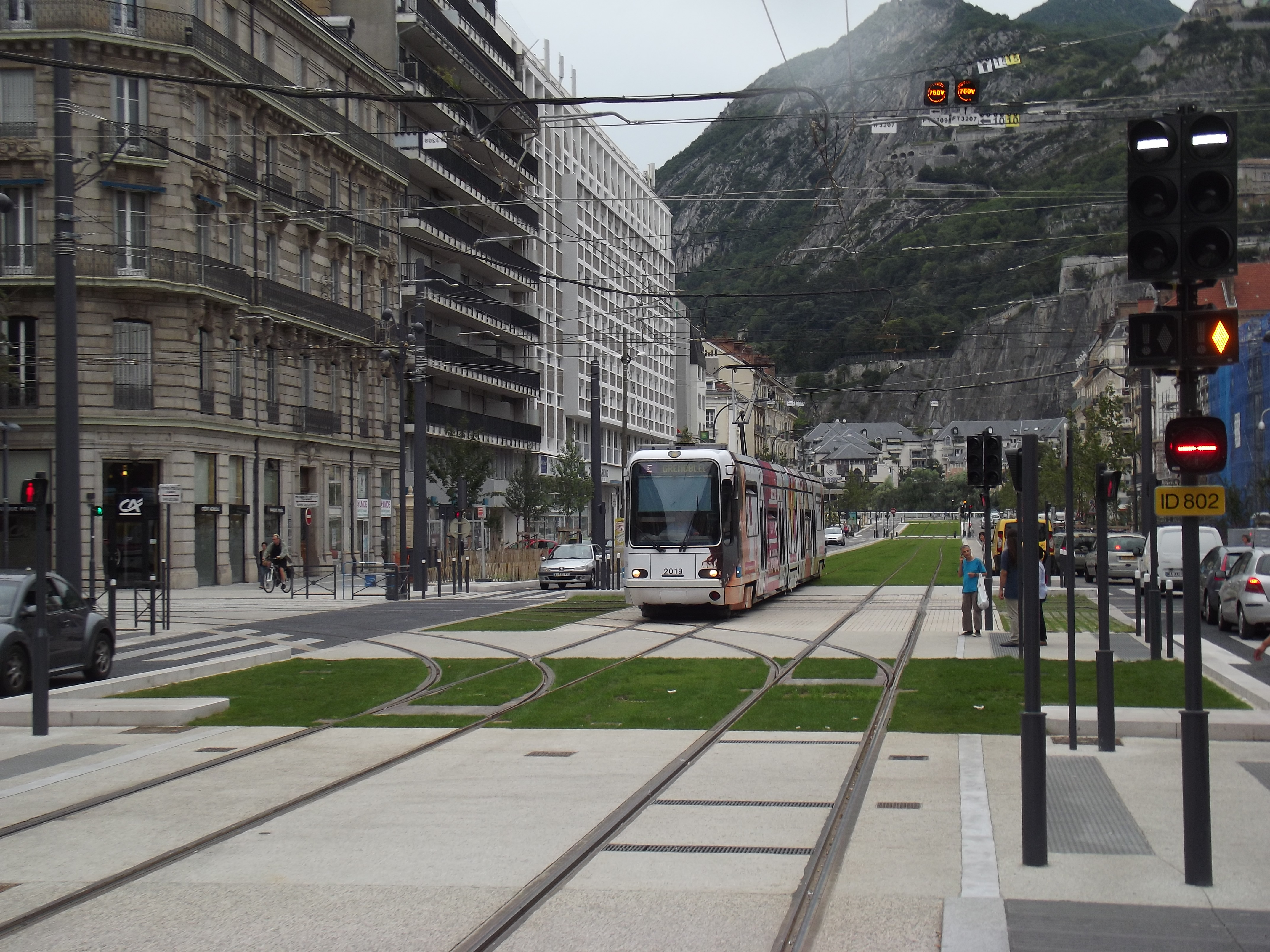 Tram E in Grenoble